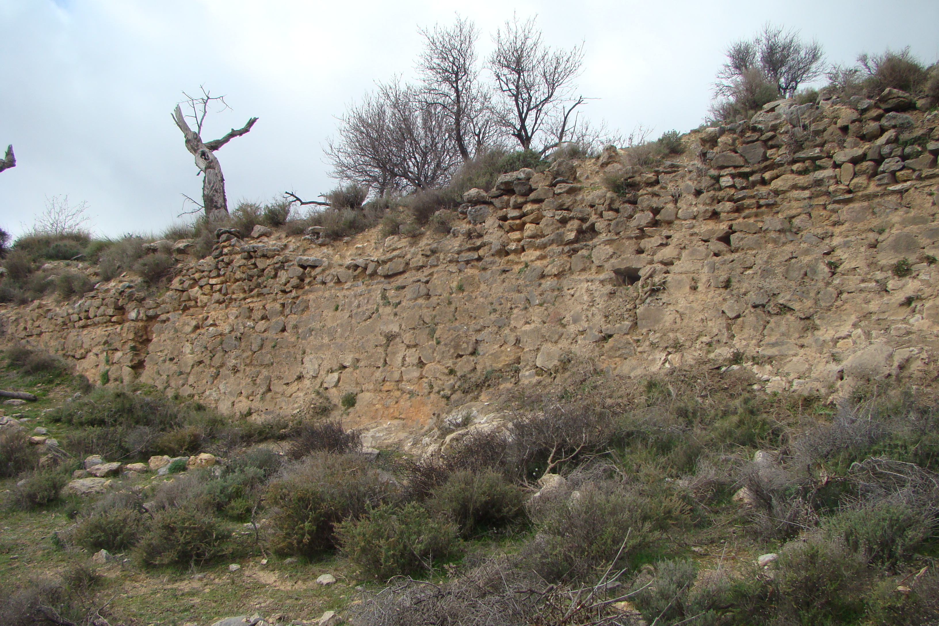 Paño sur de la muralla del Fuerte de Juviles (Granada, España)